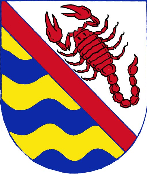 Česky: znak obce Slatinice